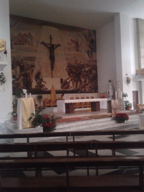 Chiesa di San Sebastiano, Massa. Presbiterio